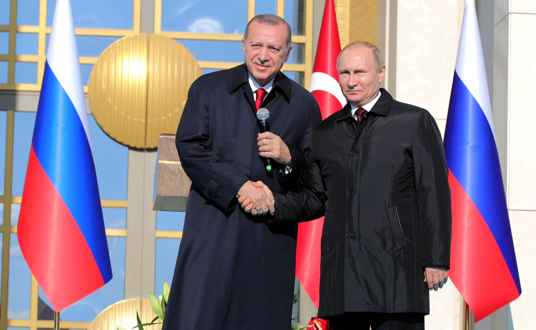 Церемония запуска строительства АЭС «Аккую». Президент России Владимир Путин и Президент Турецкой Республики Реджеп Тайип Эрдоган в режиме видеоконференции дали старт началу строительства атомной электростанции «Аккую».